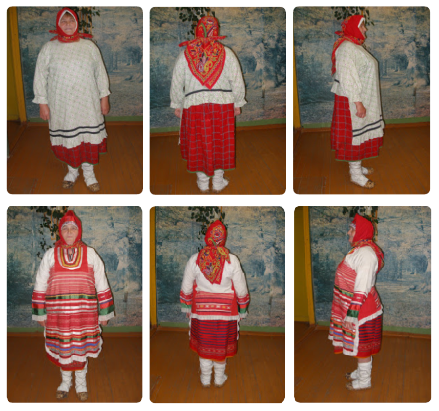 Женский народный костюм с.Чермные Кадомского района Рязанской области